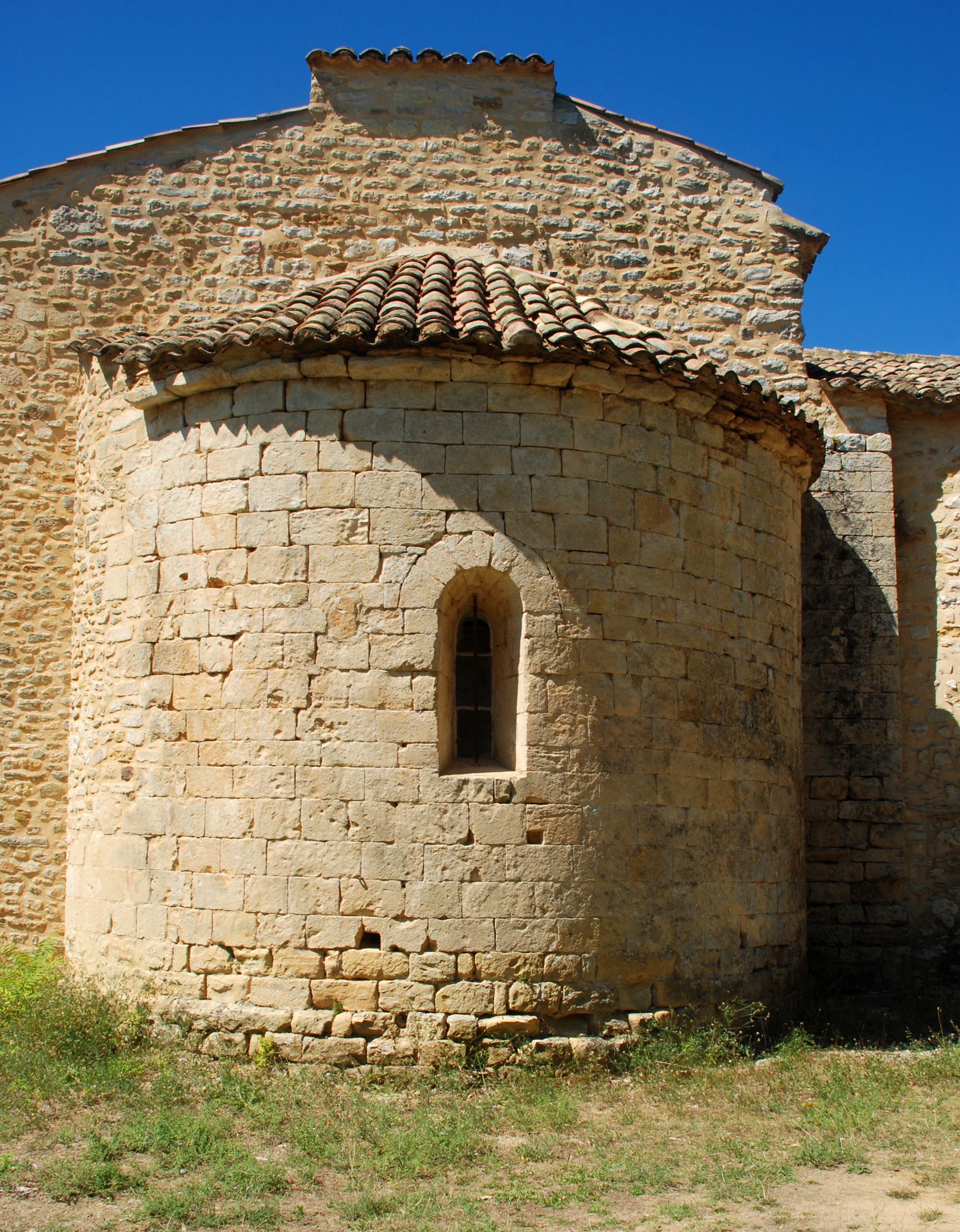 France - Gard - Cavillargues - Ermitage Notre-Dame-du-Saint-Sépulcre .